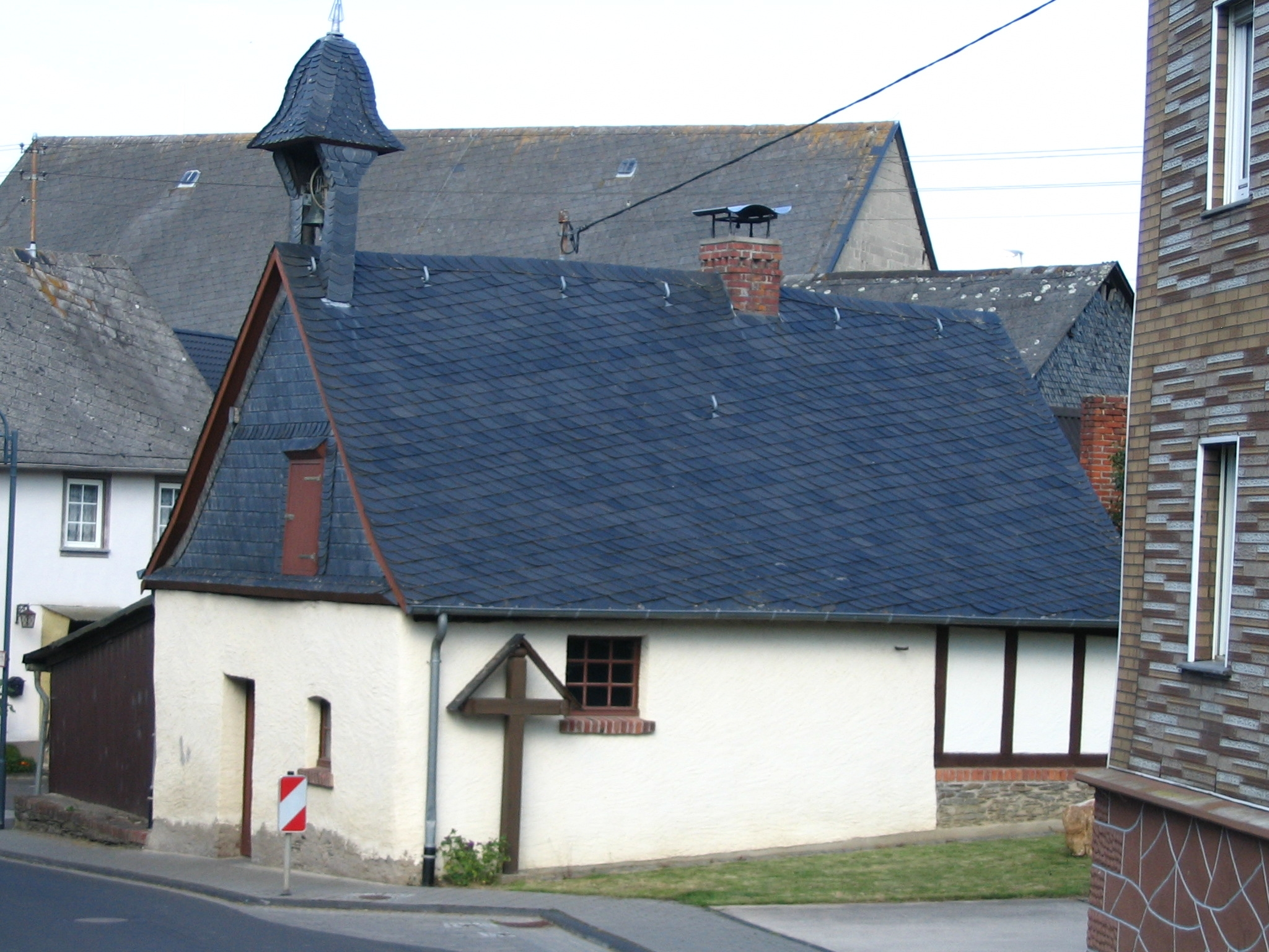 Backes Nieder Kostenz